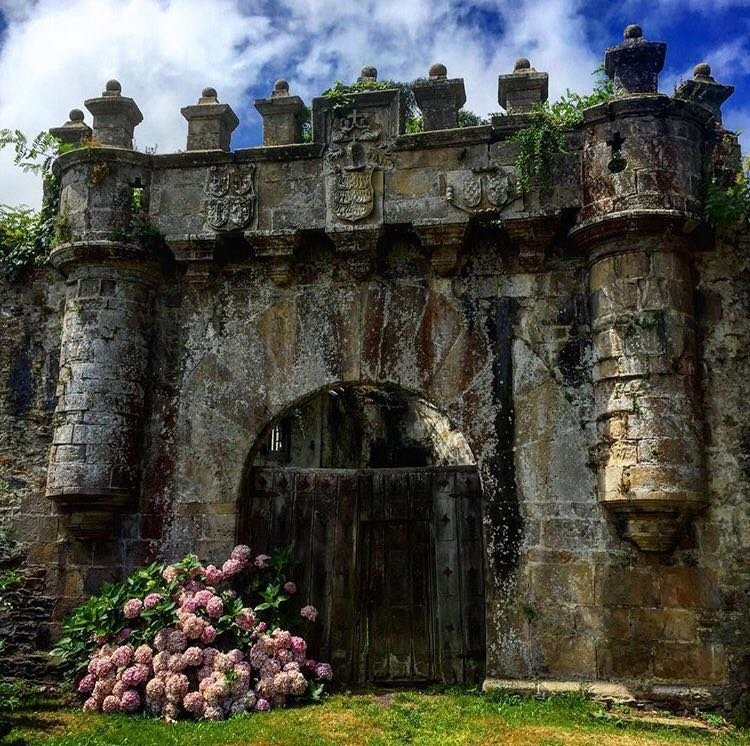 Entradera del Palaciu de Valdecarzana en Muros.